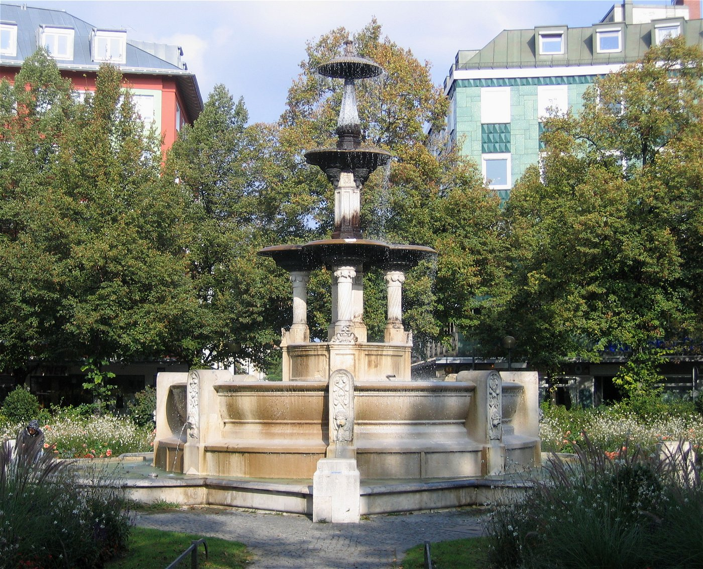 Glaspalastbrunnen am Weissenburgerplatz, München